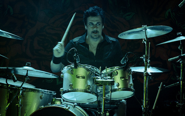 A Banda de Metal Sinfônico Therion apresenta-se em São Paulo, Brasil.